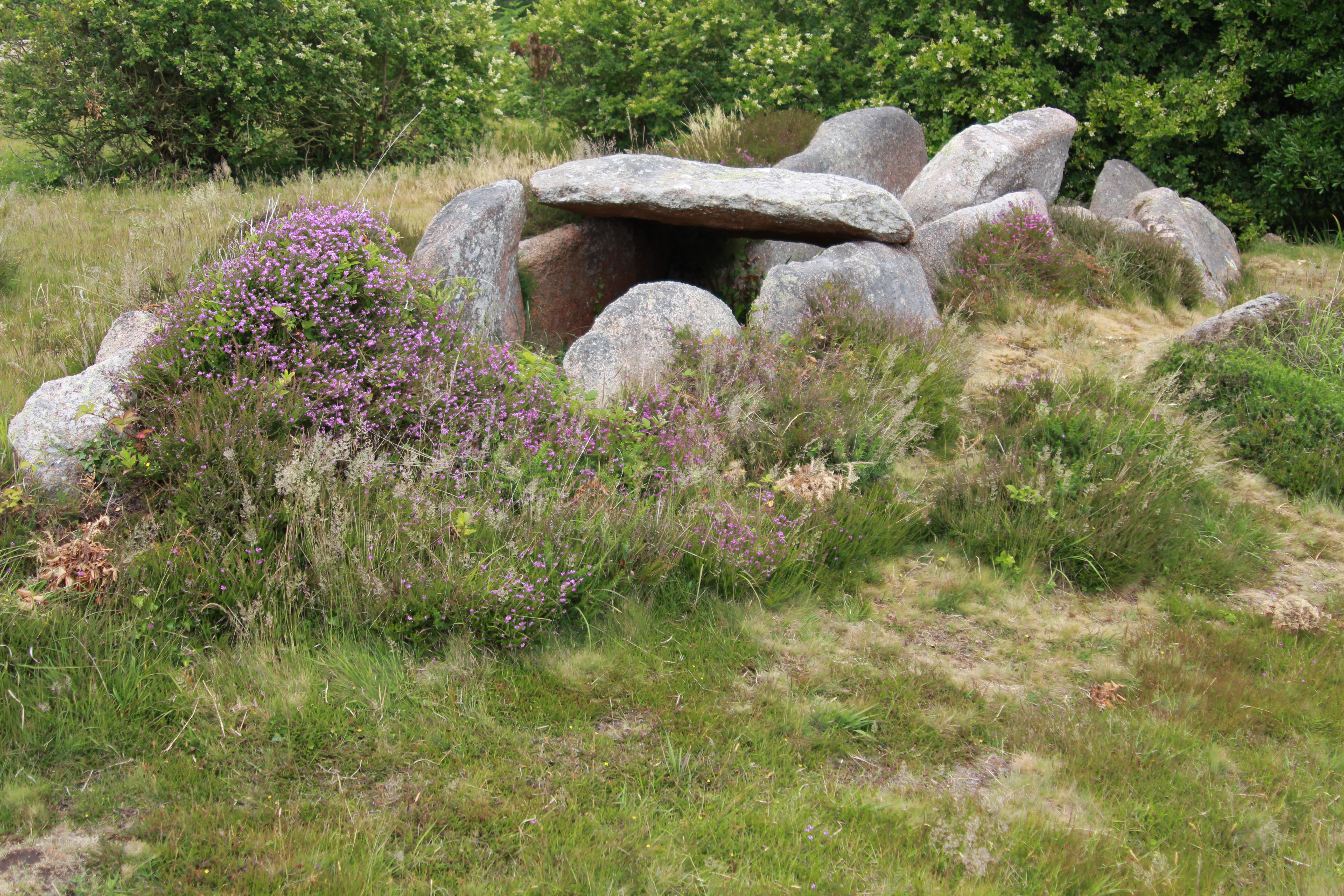 Comme on peut le voir sur la photo, il s'agit d'une allée couverte en ruine dénommée 'dolmen' dans le classement MH Elle est située sur un terrain privé avec une servitude d'accès, à Trégastel, Côtes d'Armor